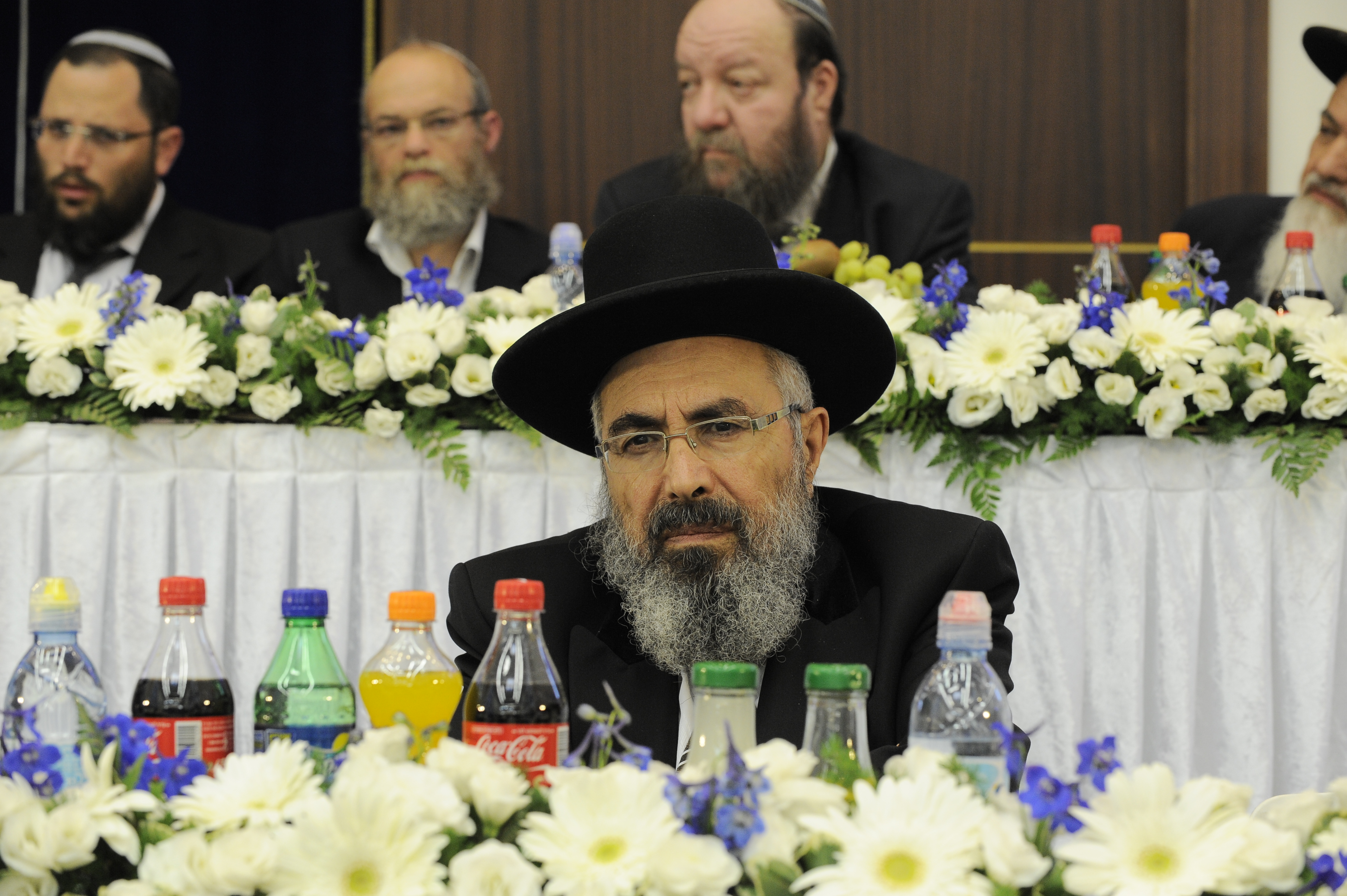 ישיבת מרכז הרב. הרב רצון ערוסי בטקס יום ירושלים בישיבת מרכז הרב, תשע"ה